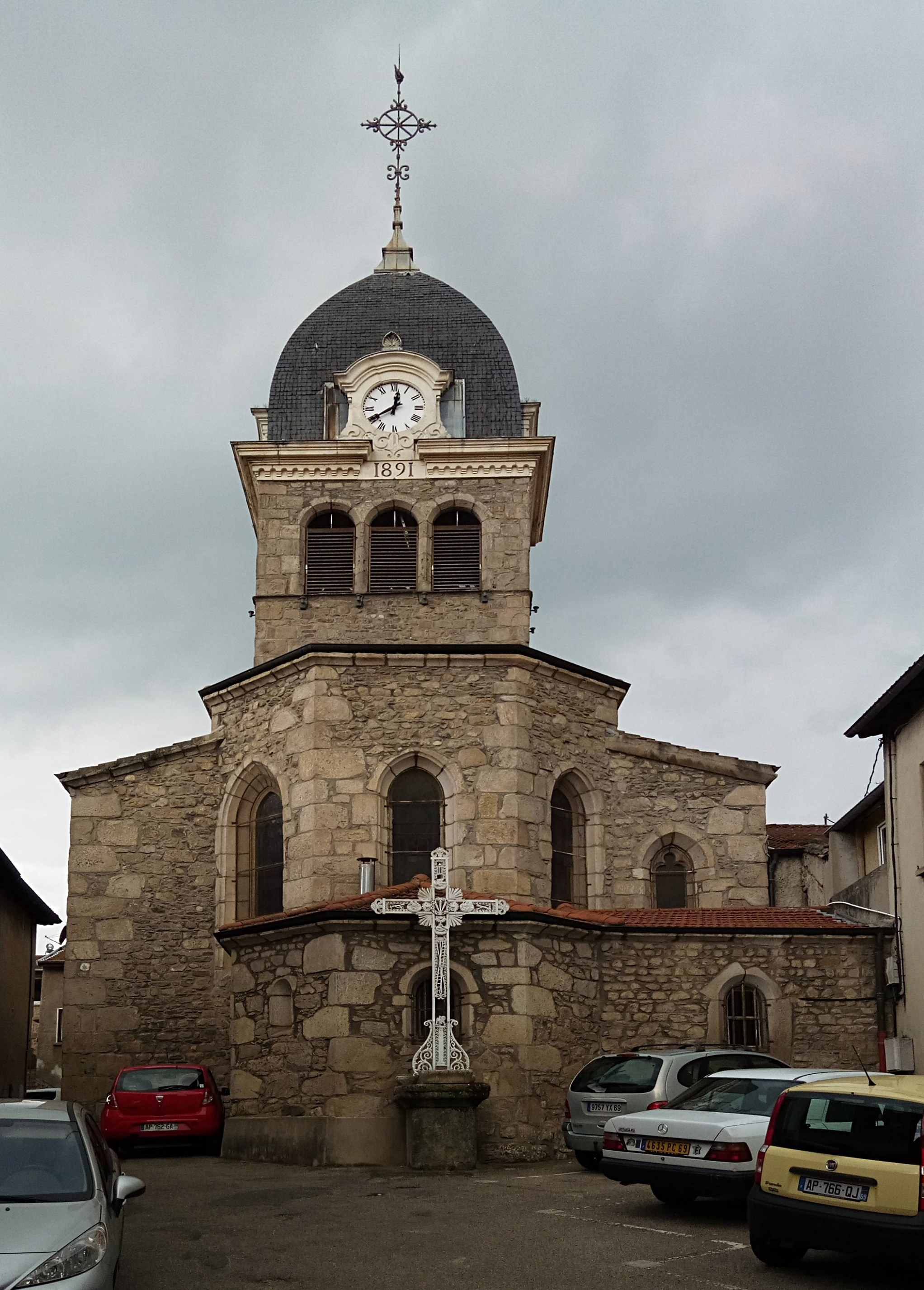 Église de Saint-Andéol-le-Château, Rhône, France.